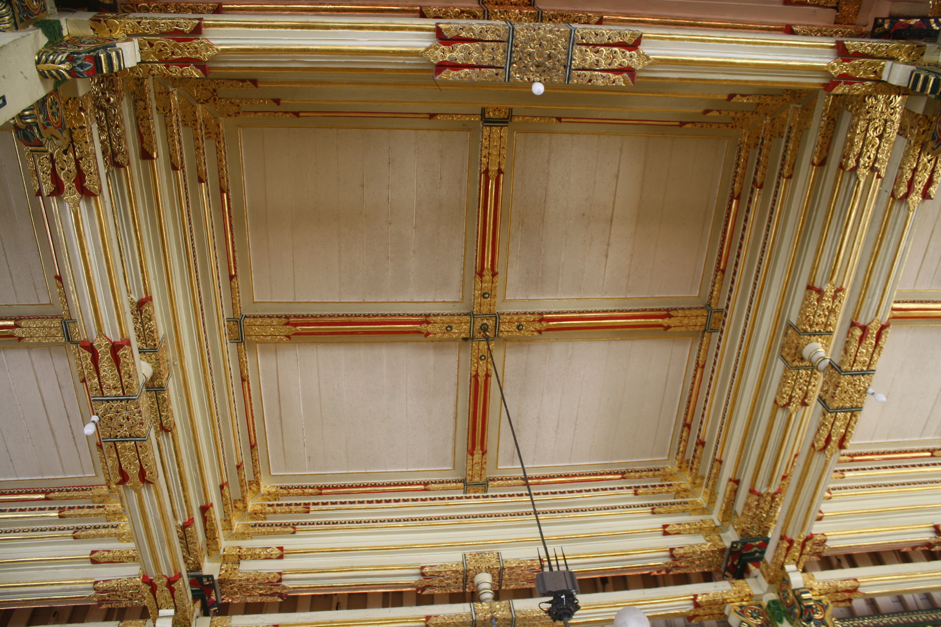 sebagian ornamen yang ada di masjid raya kauman yogyakrta